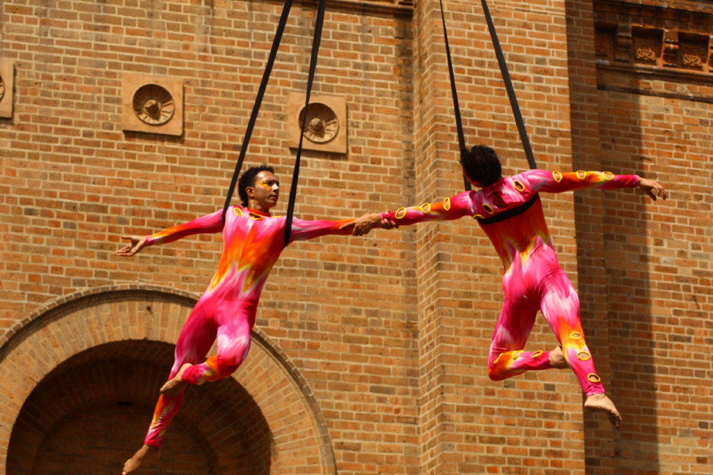 Siguiendo el fuego de los Juegos Suramericanos - Espectaculos